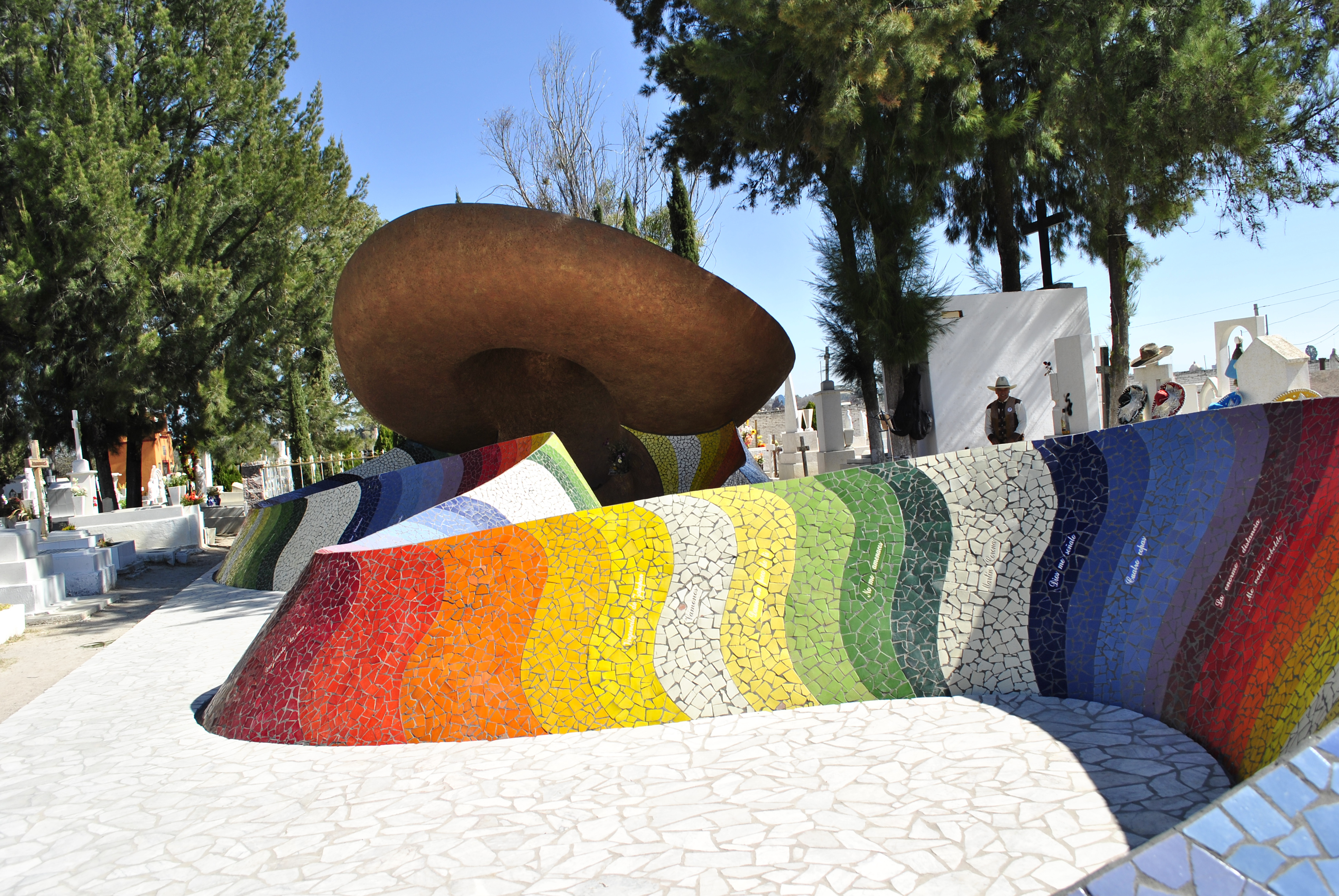 Mausoleo José Alfredo Jiménez, Guanajuato